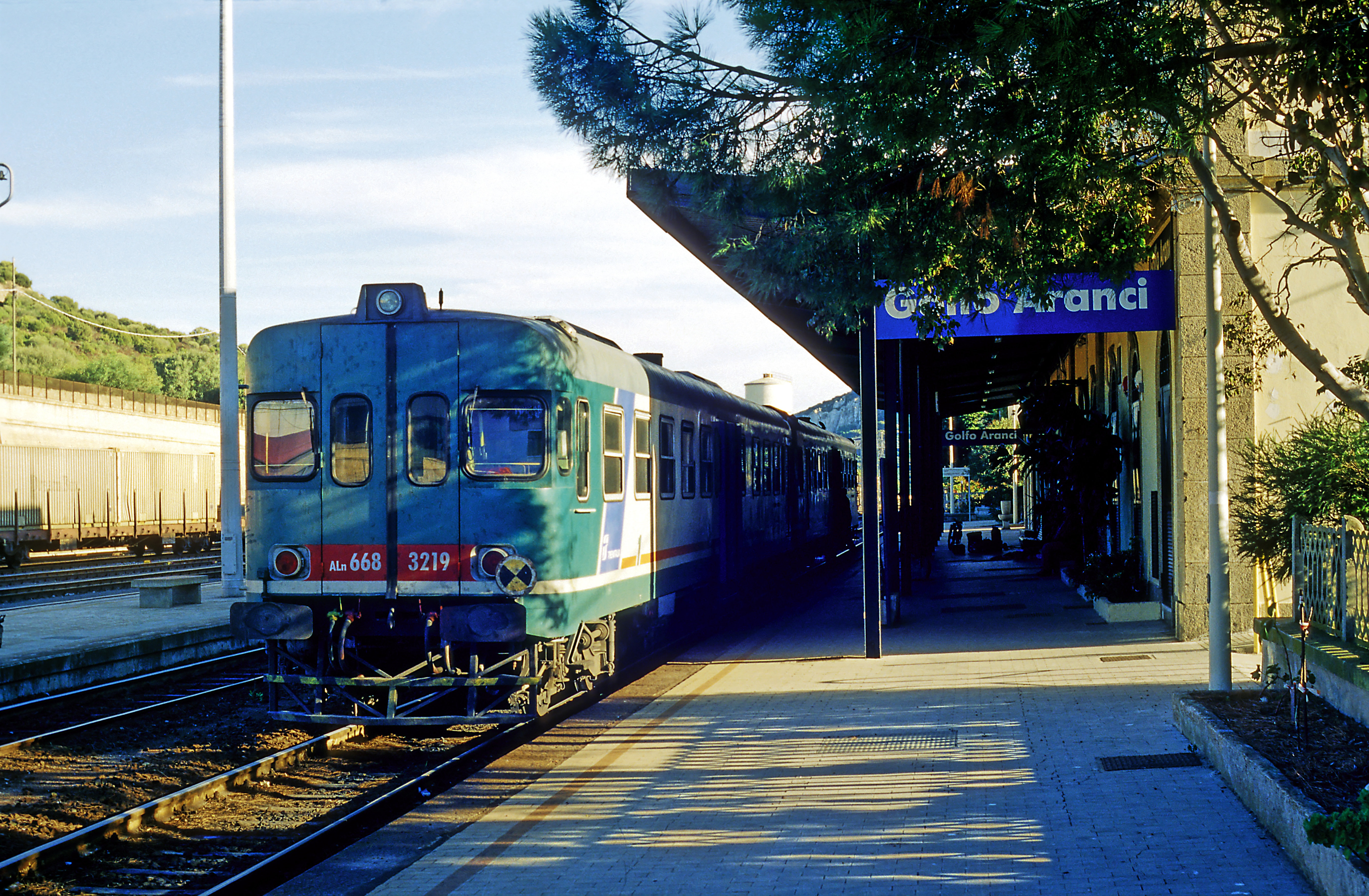 Triebwagen von und nach Oristano, wegen des Höhenunterschiedes musste zum Anbinden des Fährhafens eine Spitzkehre vorgesehen werden.